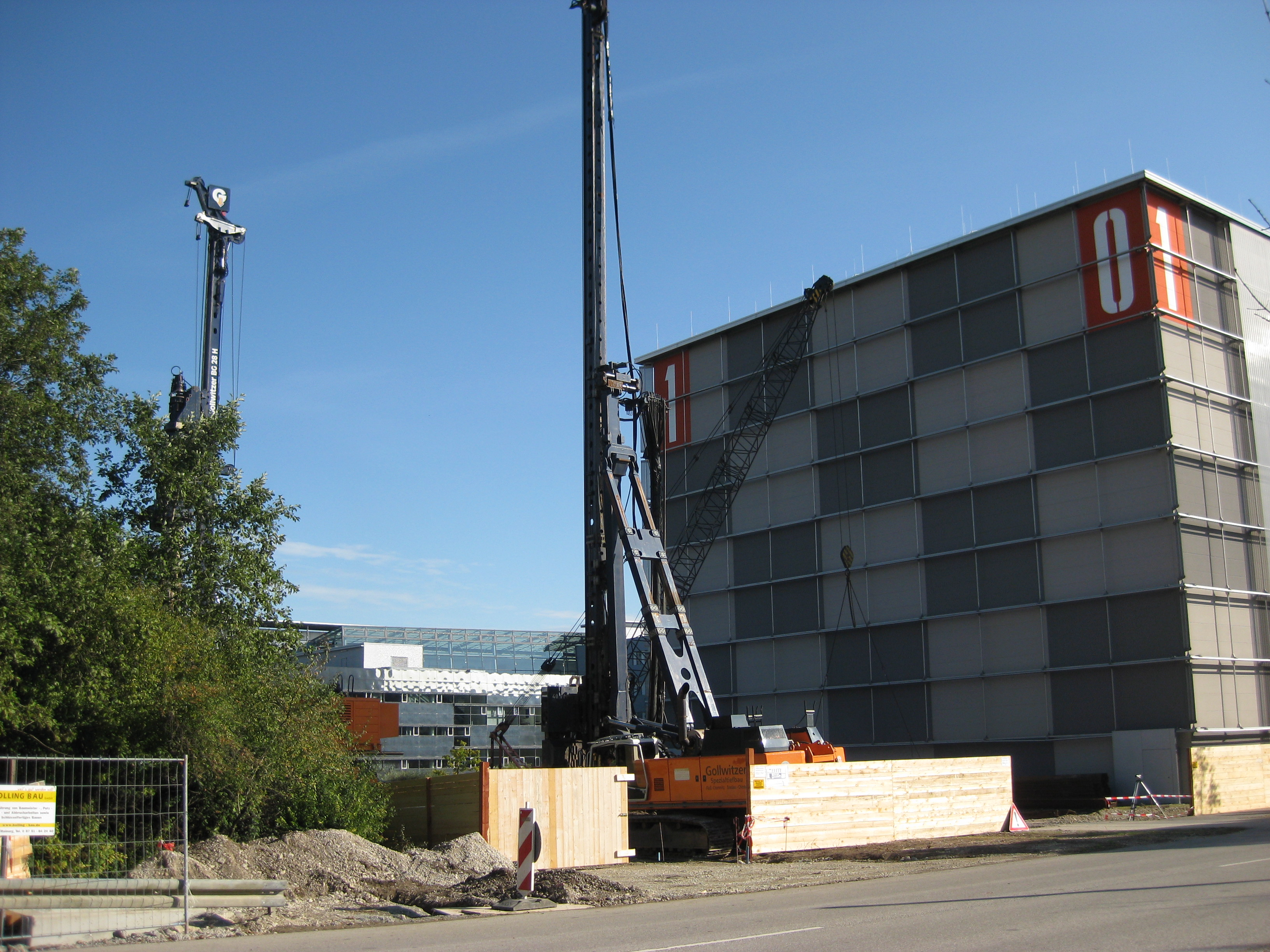 SuperMUC construction site next to HLRB II